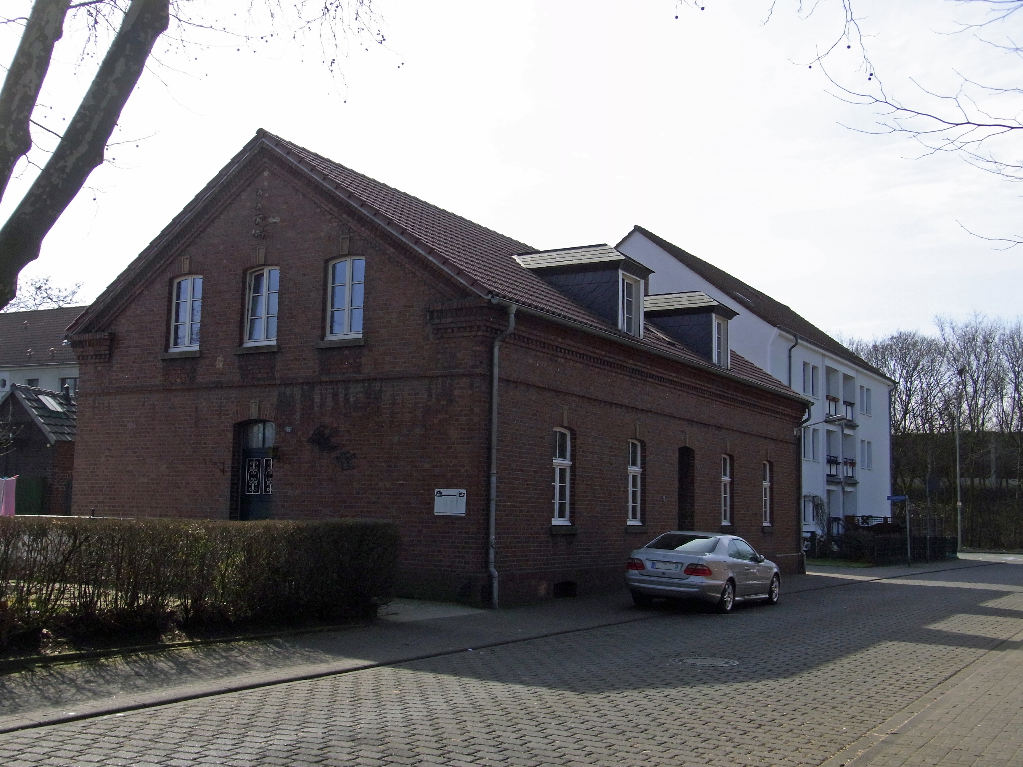 Siedlung Eisenheim